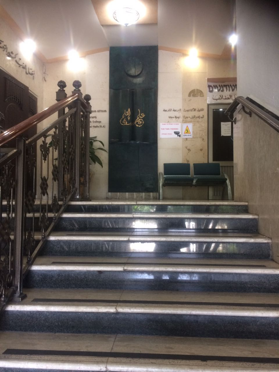 חלל הפנים בכניסה למכללה הערבית לחינוך